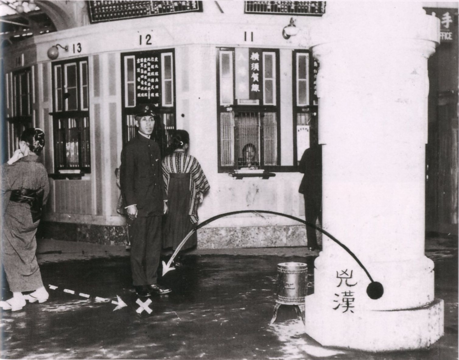 東京駅丸の内南改札口付近の、原敬暗殺事件の現場。左から原が歩いて来た所、柱の陰(「兇漢」と書かれた位置)から犯人・中岡艮一が突進し、原を短刀で刺した。